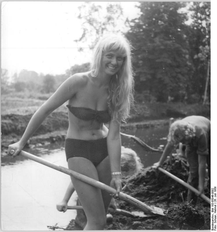 Badrina, Studentin beim Arbeitseinsatz Zentralbild Schaar 26.7.1959 Erstes sozialistisches Studentenlager der Medizinischen Fakultät der Karl-Marx-Universität Leipzig. Drei Wochen lang verleben 800 Medizinstudentinnen und -studenten einen Teil ihrer Semesterferien im sozialistischen Studentenlager Badrina (Bezirk Leipzig). Neben Sport und Spiel lösten sie wirtschaftliche Augaben. Bei Meliorationsarbeiten im MTS-Bereich Badrina und Erntehilfe bei einigen LPG schafften die Studenten einen ökonomischen Nutzen von 85.000 DM. UBz: Der Medizinstudention Claudia Neumann macht die Arbeit sichtlich Spaß.